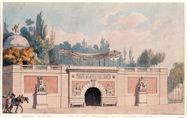 Porte du jardin Beaumarchais sur le boulevard Saint-Antoine Dessin à la plume et lavis à l'encre de Chine, aquarelle ; 20,2 x 33 cm Paris, Bibliothèque nationale de France, fonds Destailleur Référence bibliographique : Destailleur Paris, t. 1, 146